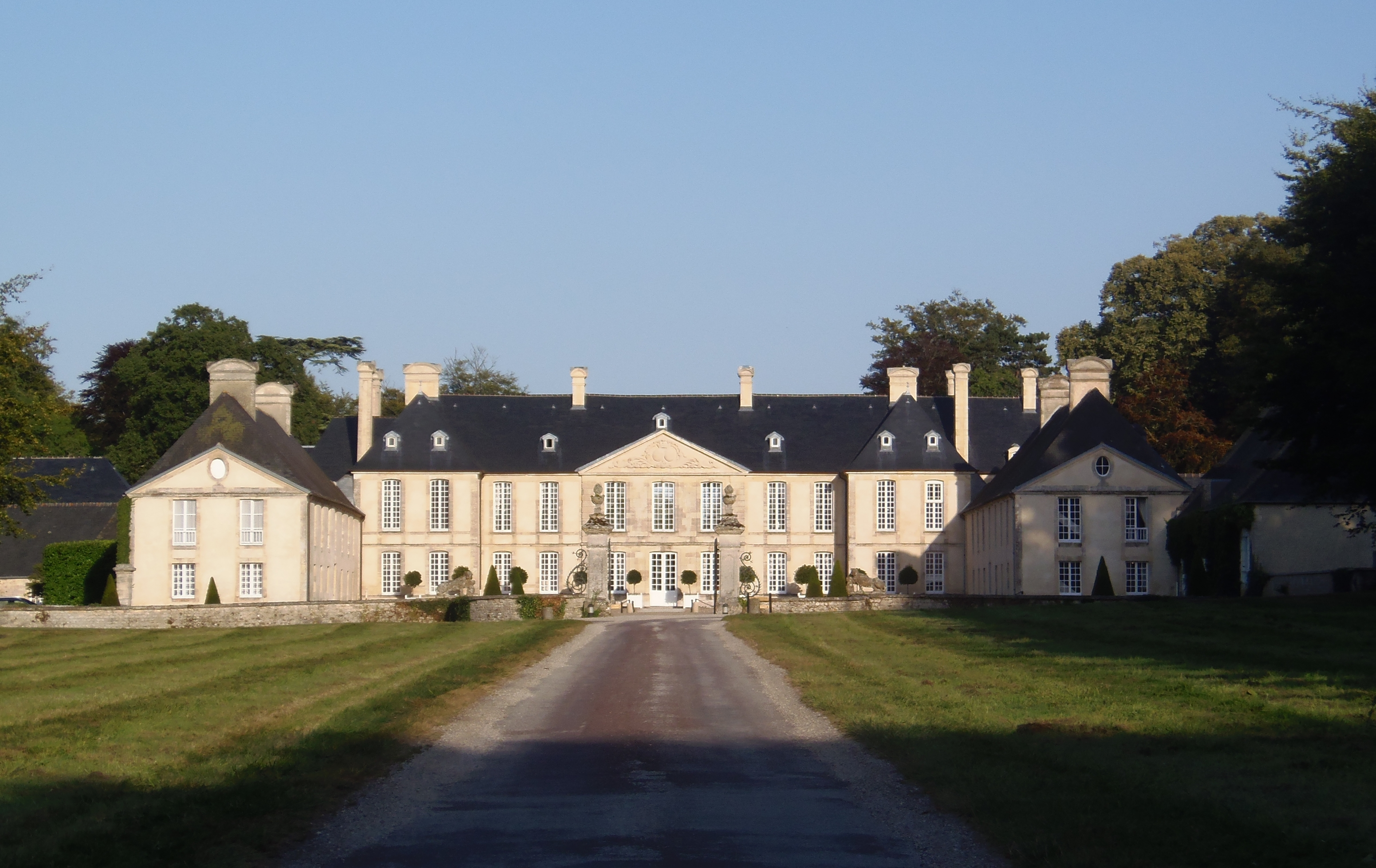 Audrieu (Normandie, France). Le château.